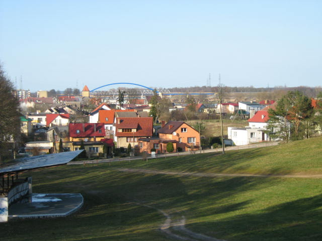 Panorama Wolina